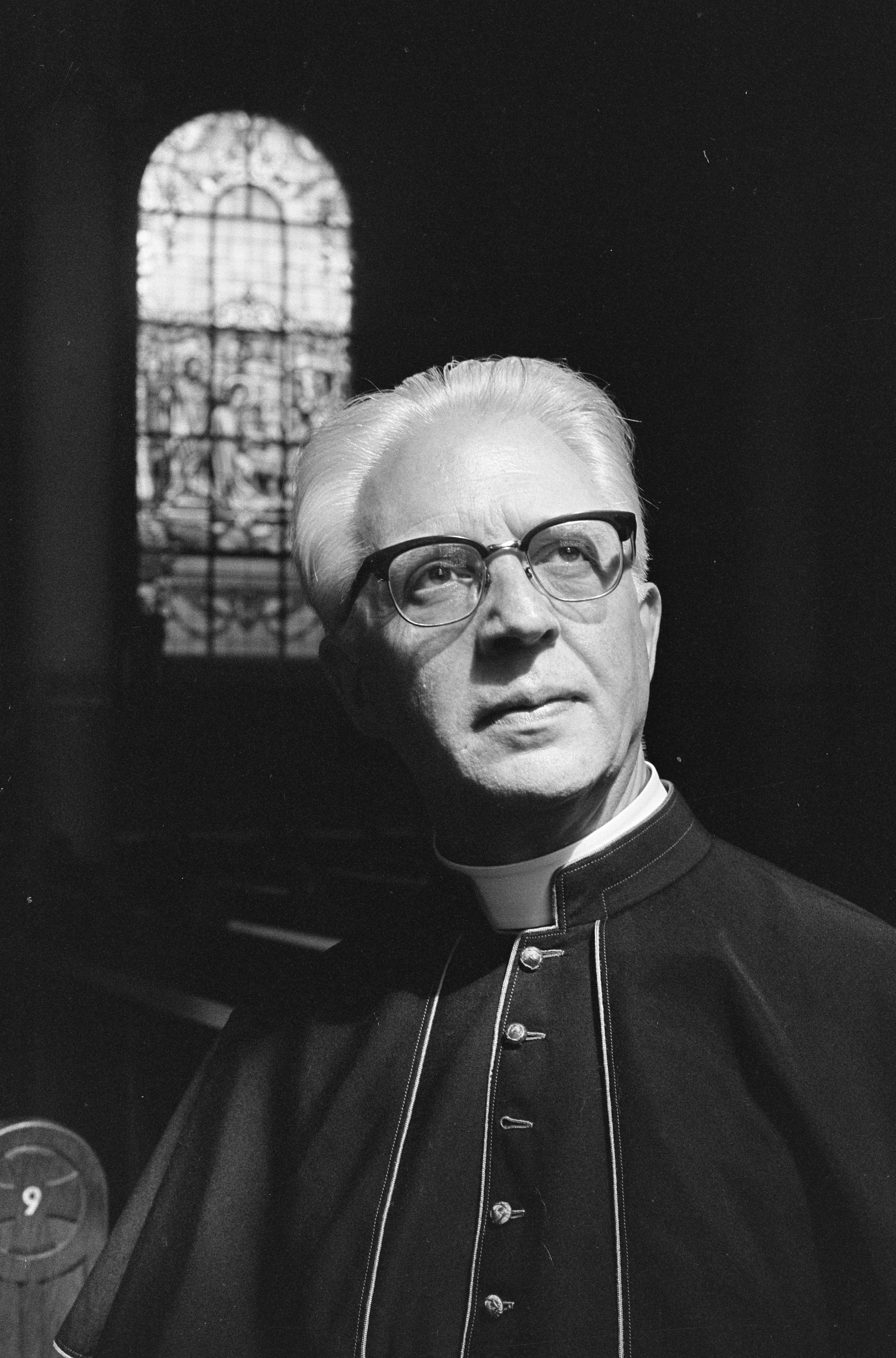 Collectie / Archief : Fotocollectie Anefo Reportage / Serie : [ onbekend ] Beschrijving : Deken Th.H. Zwartkruis (kop) benoemd tot Bisschop van Bisdom Haarlem Datum : 21 augustus 1966 Locatie : Haarlem Trefwoorden : bisschoppen Persoonsnaam : Deken Th.H. Zwartkruis Fotograaf : Nijs, Jac. de / Anefo Auteursrechthebbende : Nationaal Archief Materiaalsoort : Negatief (zwart/wit) Nummer archiefinventaris : bekijk toegang 2.24.01.05 Bestanddeelnummer : 919-4671